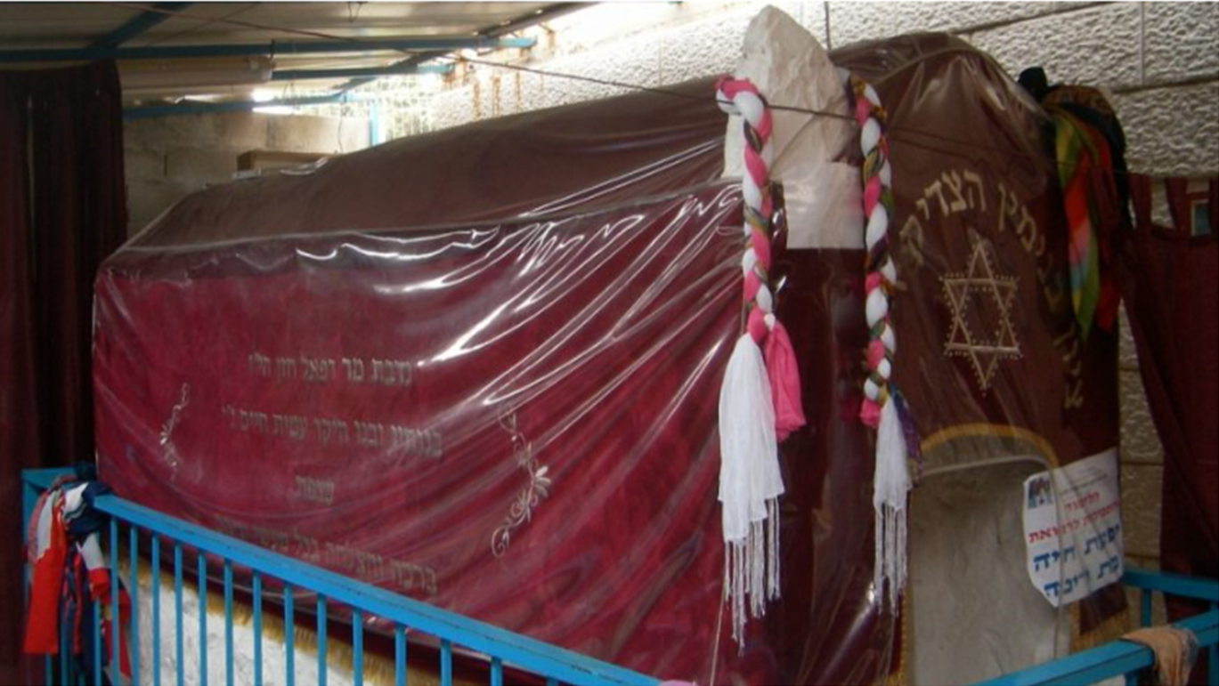 קבר בנימין הצדיק